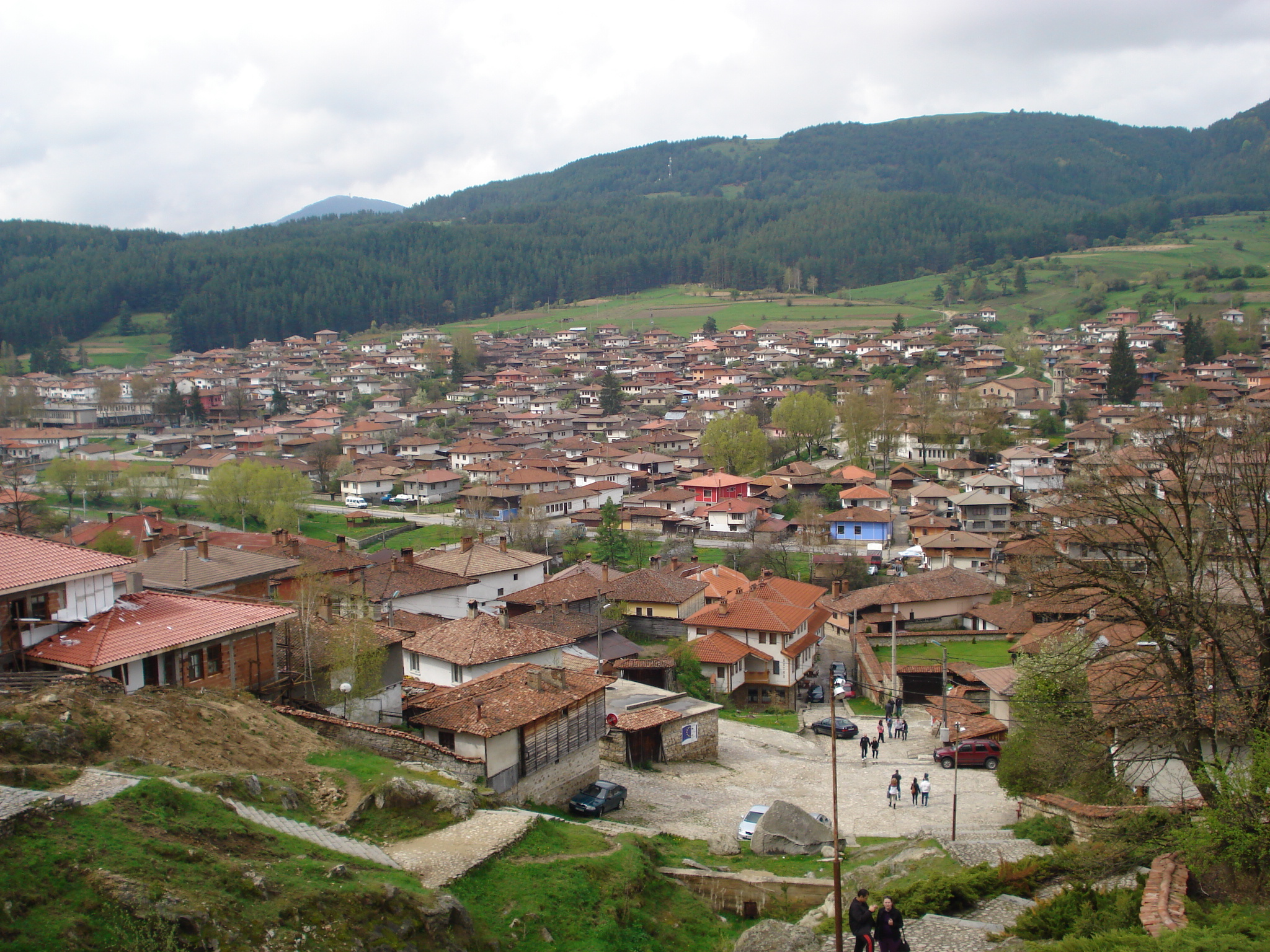 Град Копривщица